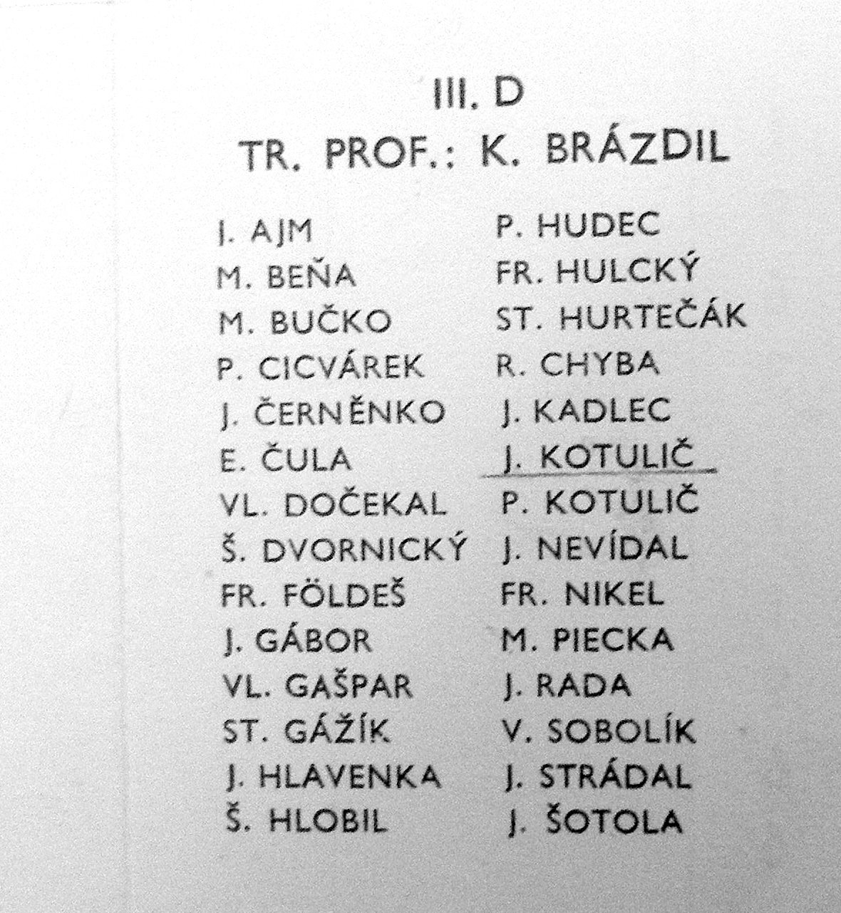 Rok 1965. Pozdrav z predmaturitného večierku -detail. Vojenská škola Jana Žižku z Trocnova v Bratislave.